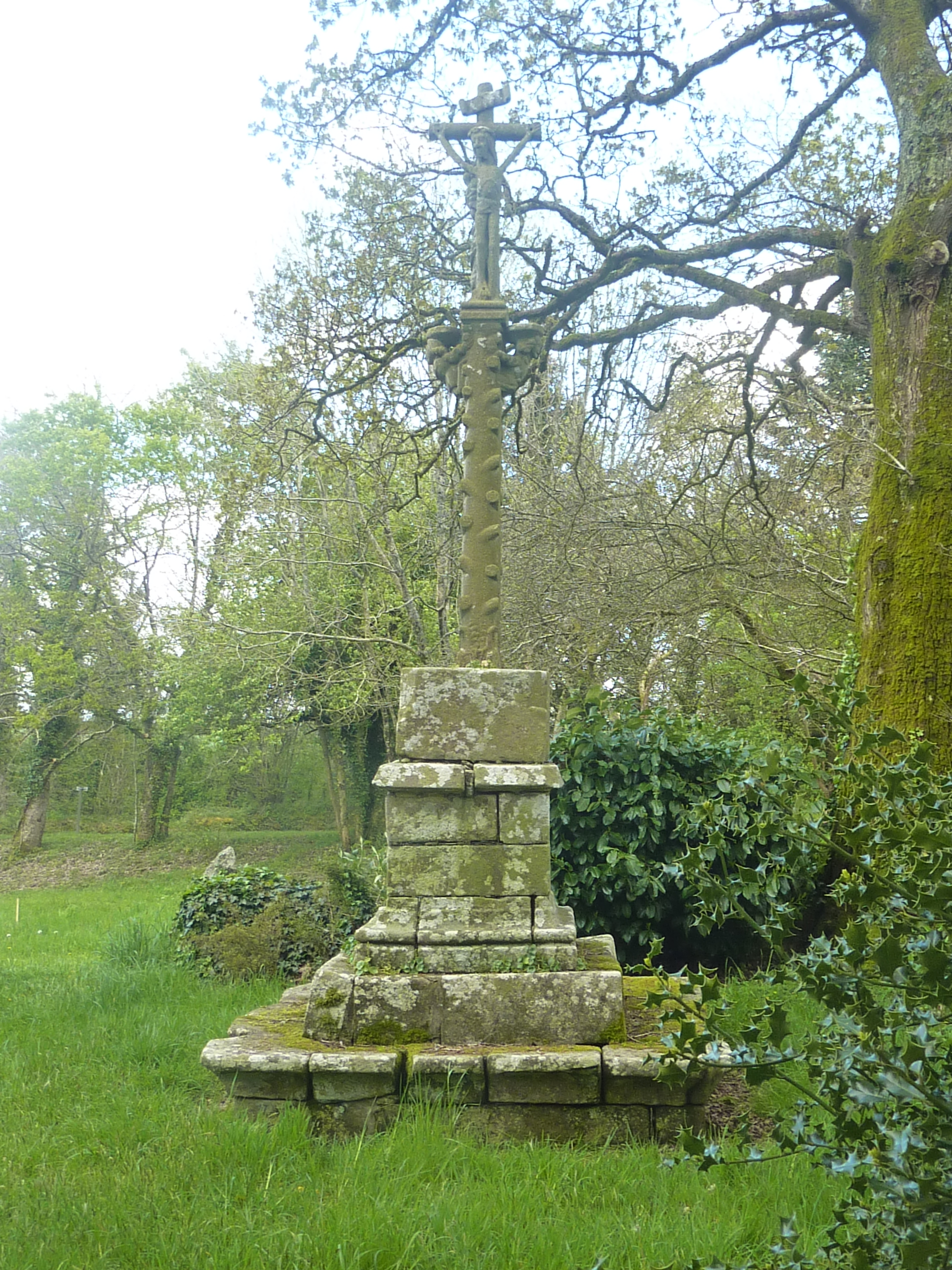 Bannalec : le calvaire de la chapelle Saint-Mathieu.